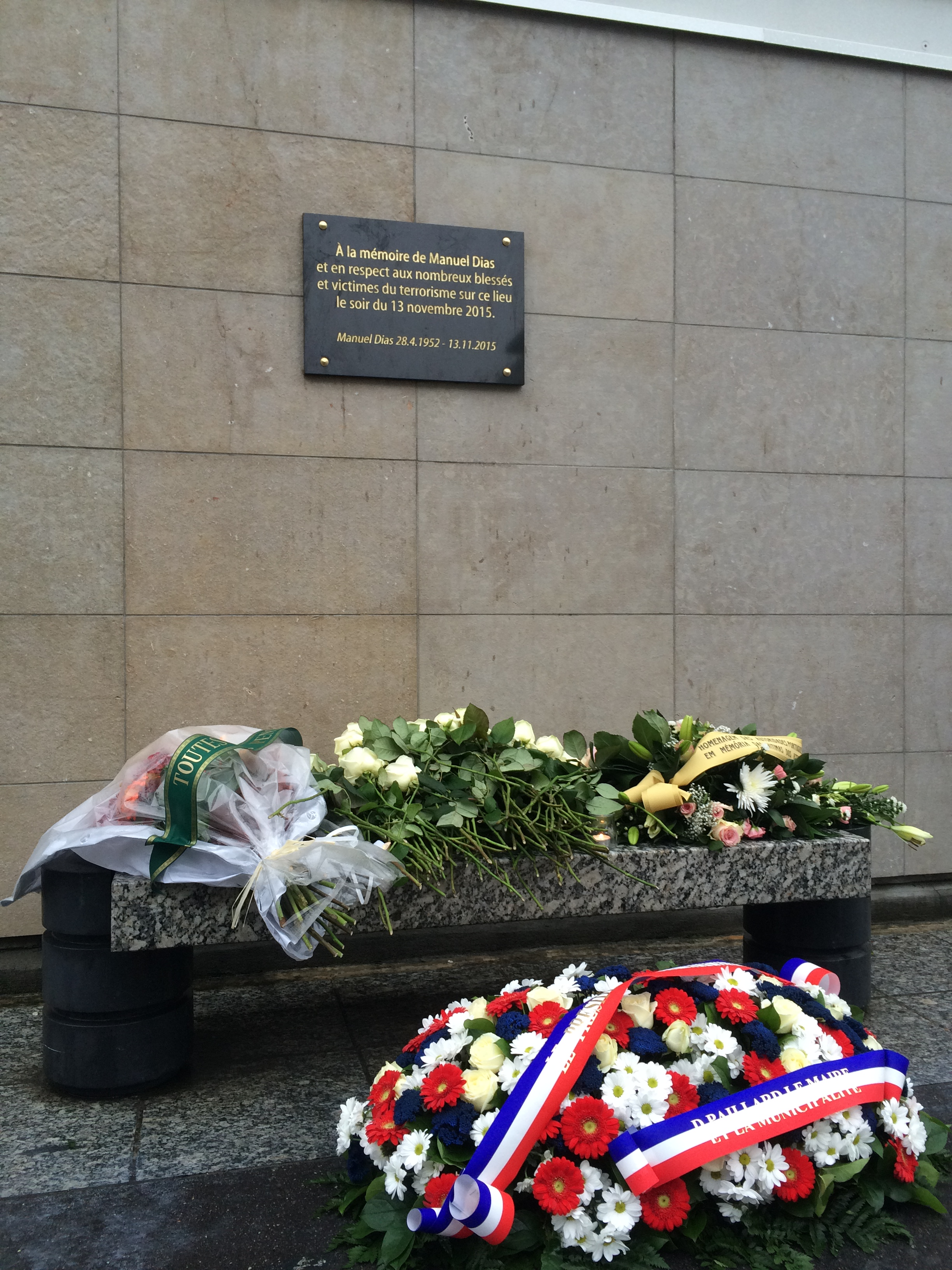 Hommage à Manuel Dias et aux victimes des attentats du 13 novembre 2015 aux abords du Stade de France porte D. Plaque et gerbes de fleurs.